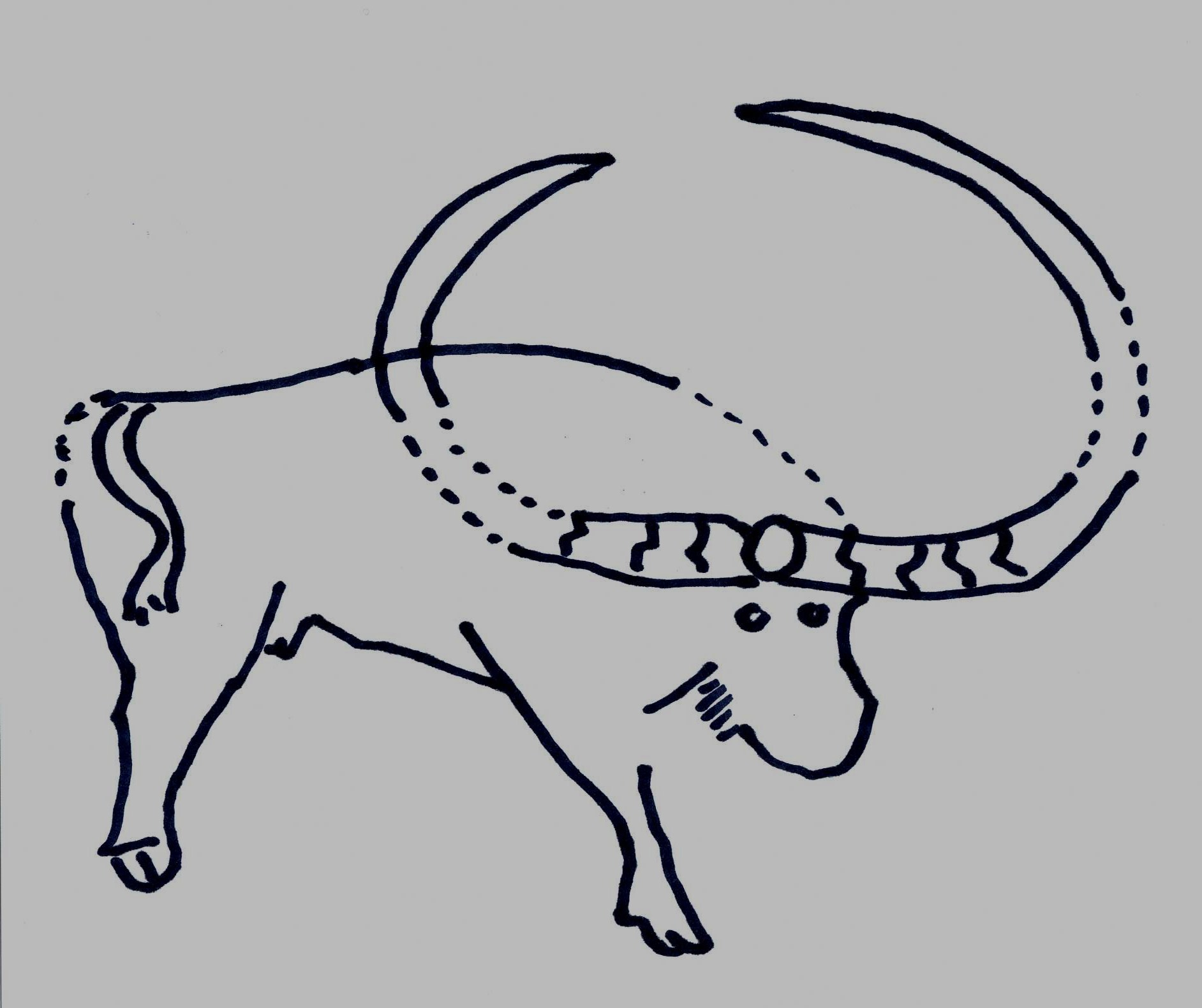 Gravure préhistotique de la région de Djelfa, Algérie, croquis schématique